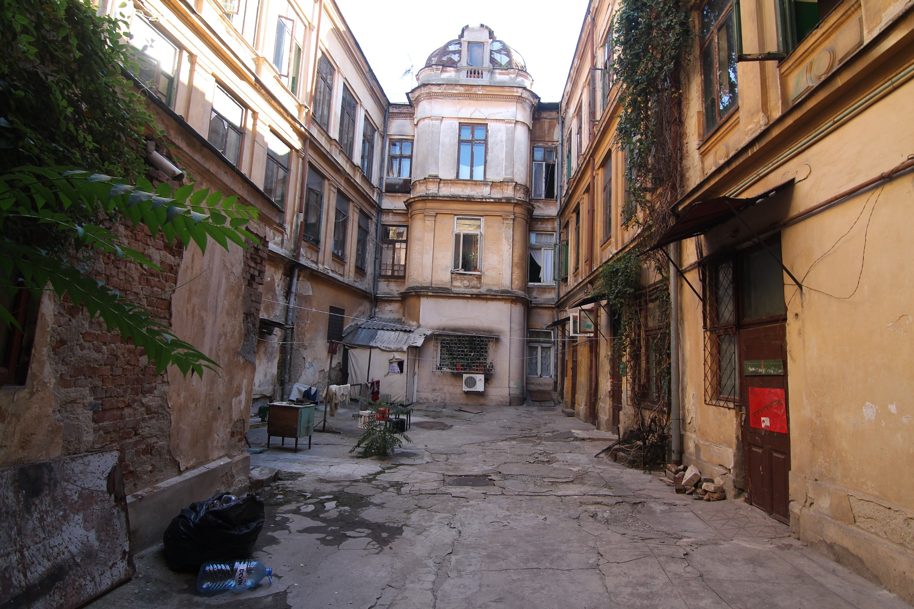 Casă pe Blănari